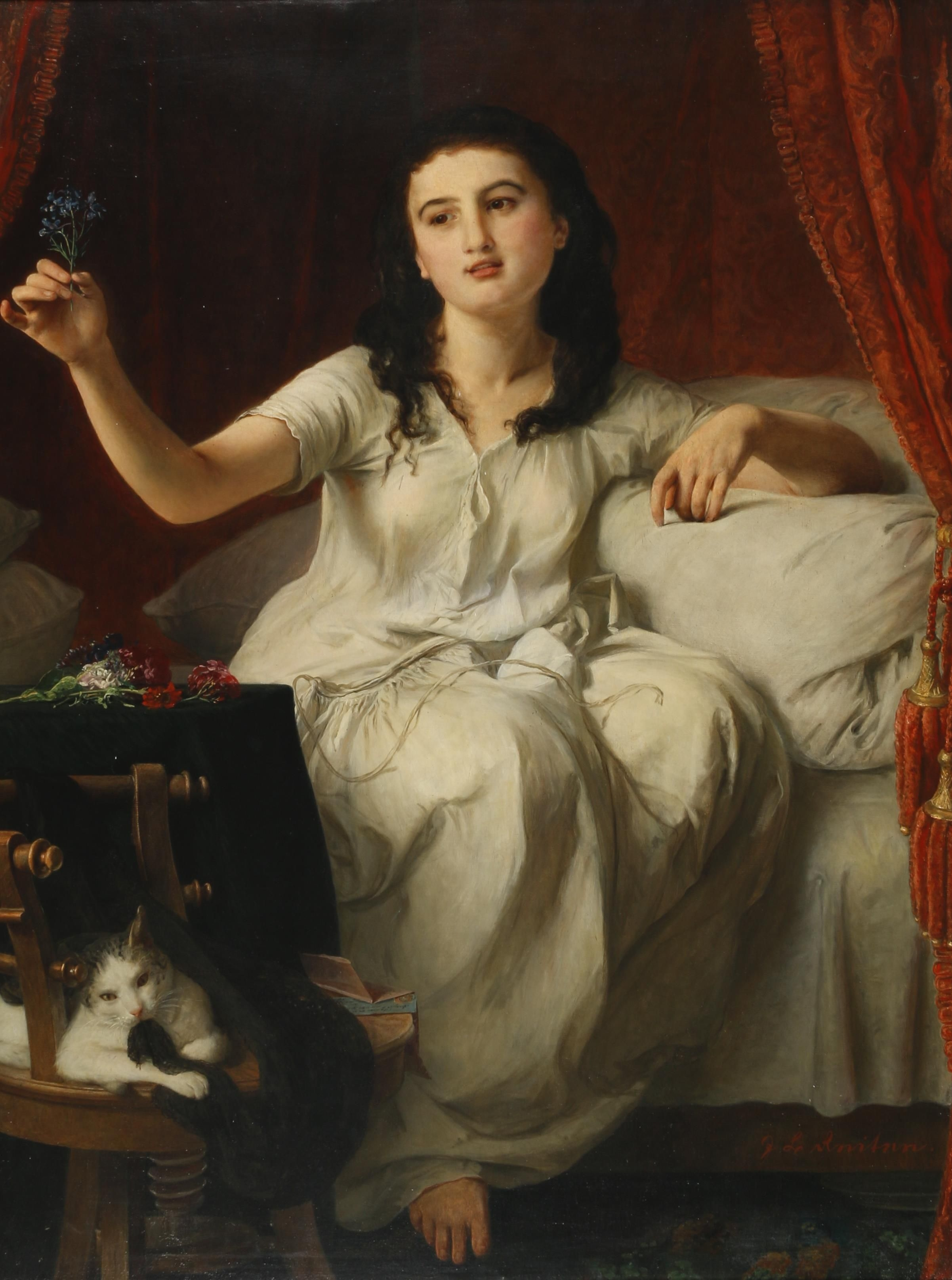 "Blumengruß am Morgen", rechts unten signiert J B Reiter, Öl auf Leinwand, ca. 126 x 95 cm, Werkverzeichnis Nr. 289